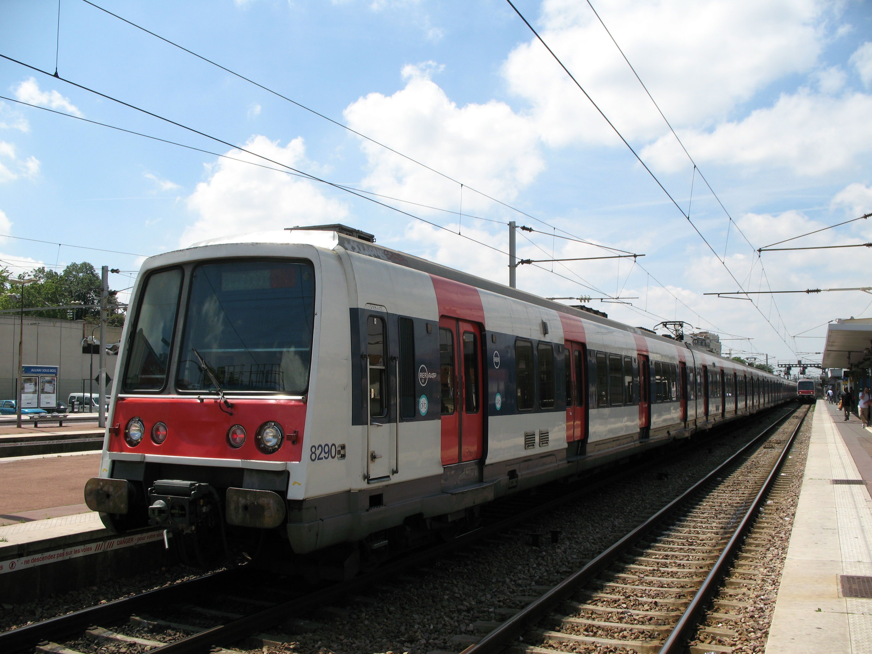 Rame MI 79 du RER B en gare d'Aulnay-sous-Bois, Seine-Saint-Denis, France